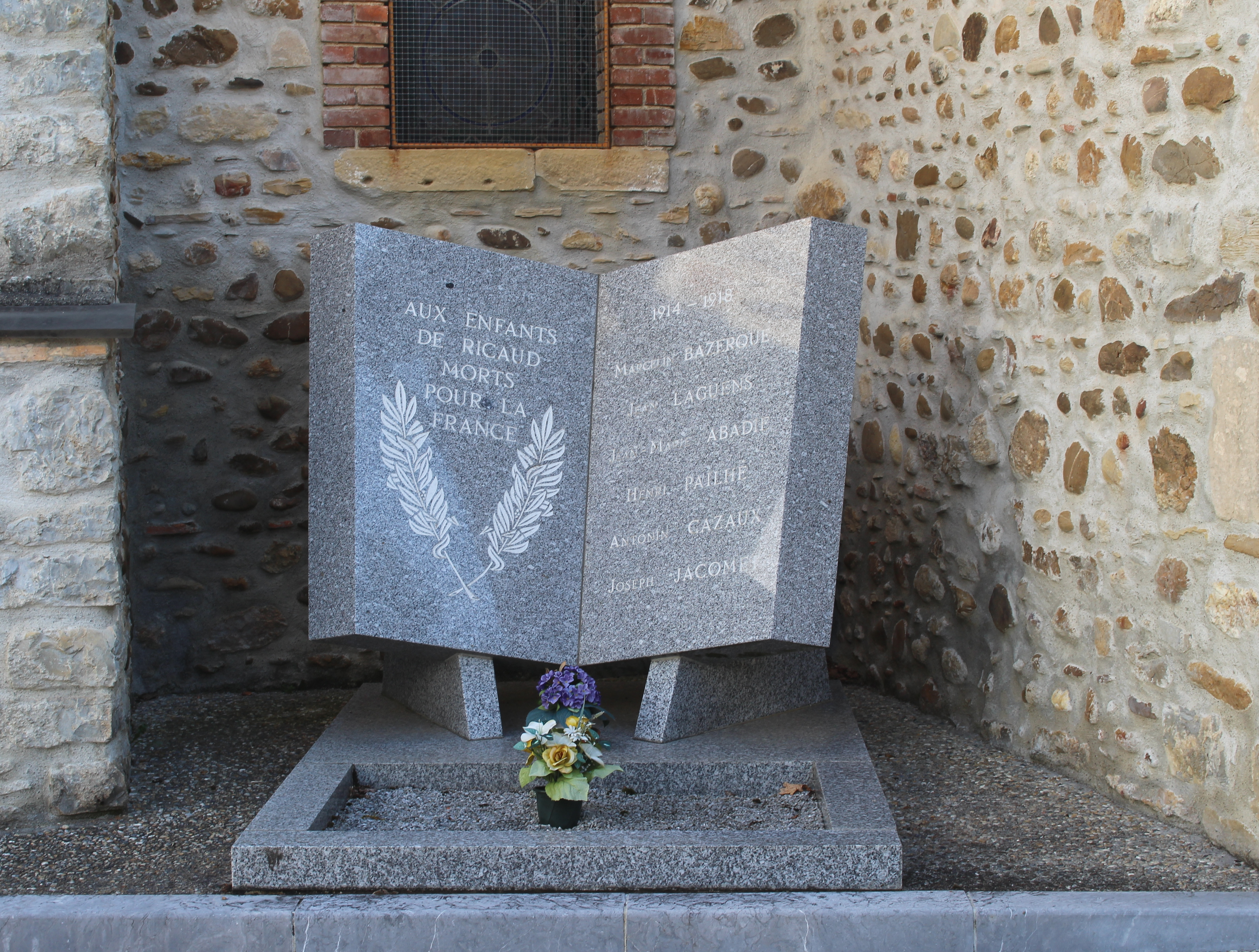 Monument aux morts de Ricaud (Hautes-Pyrénées)